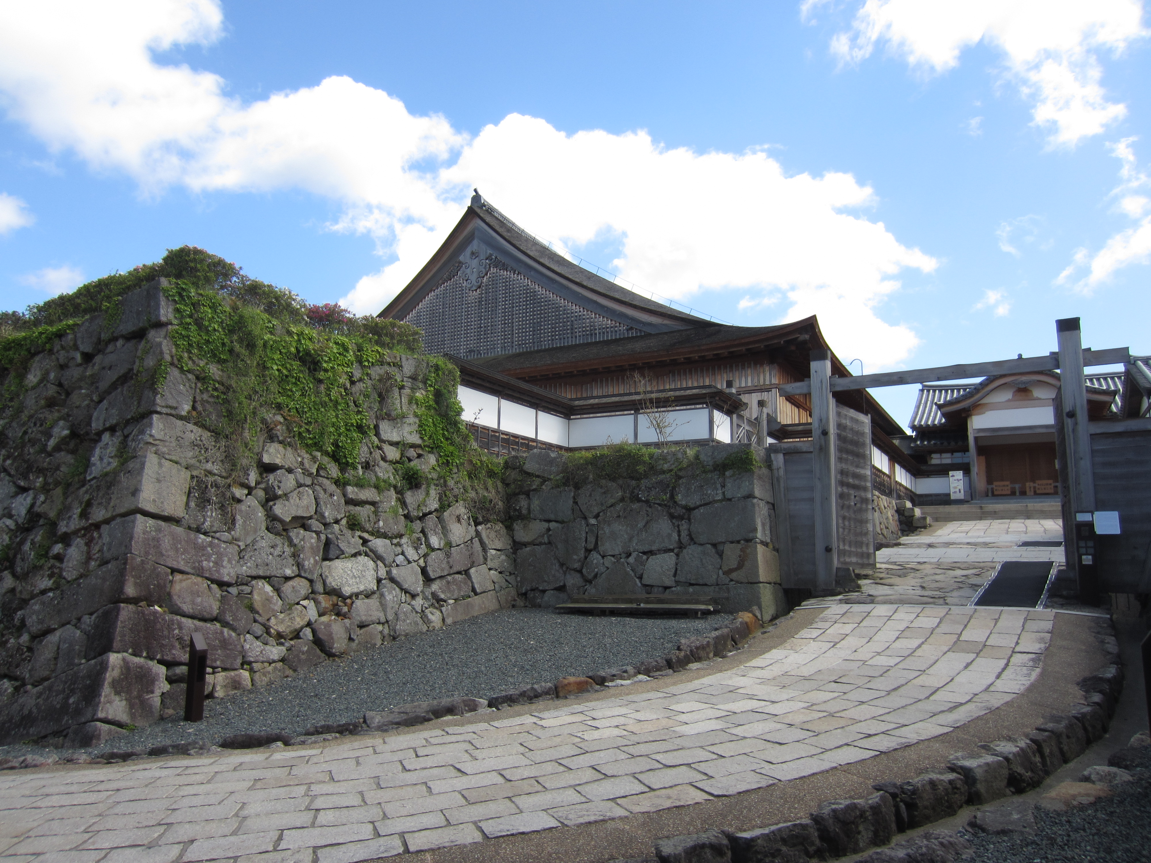 篠山城、くろがね門